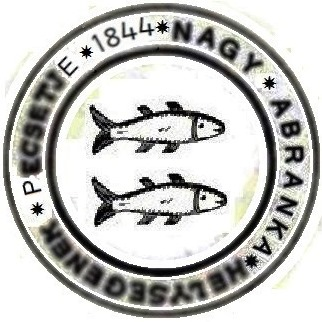 Реконструкция печати села Великая Абранка (Локоть) 1844 года на основании её описания в Beregvármegye monographiája Тивадора Легоцки (Том 1, Унгвар, 1881) с использованием аналогичных сохранившихся печатей того времени.